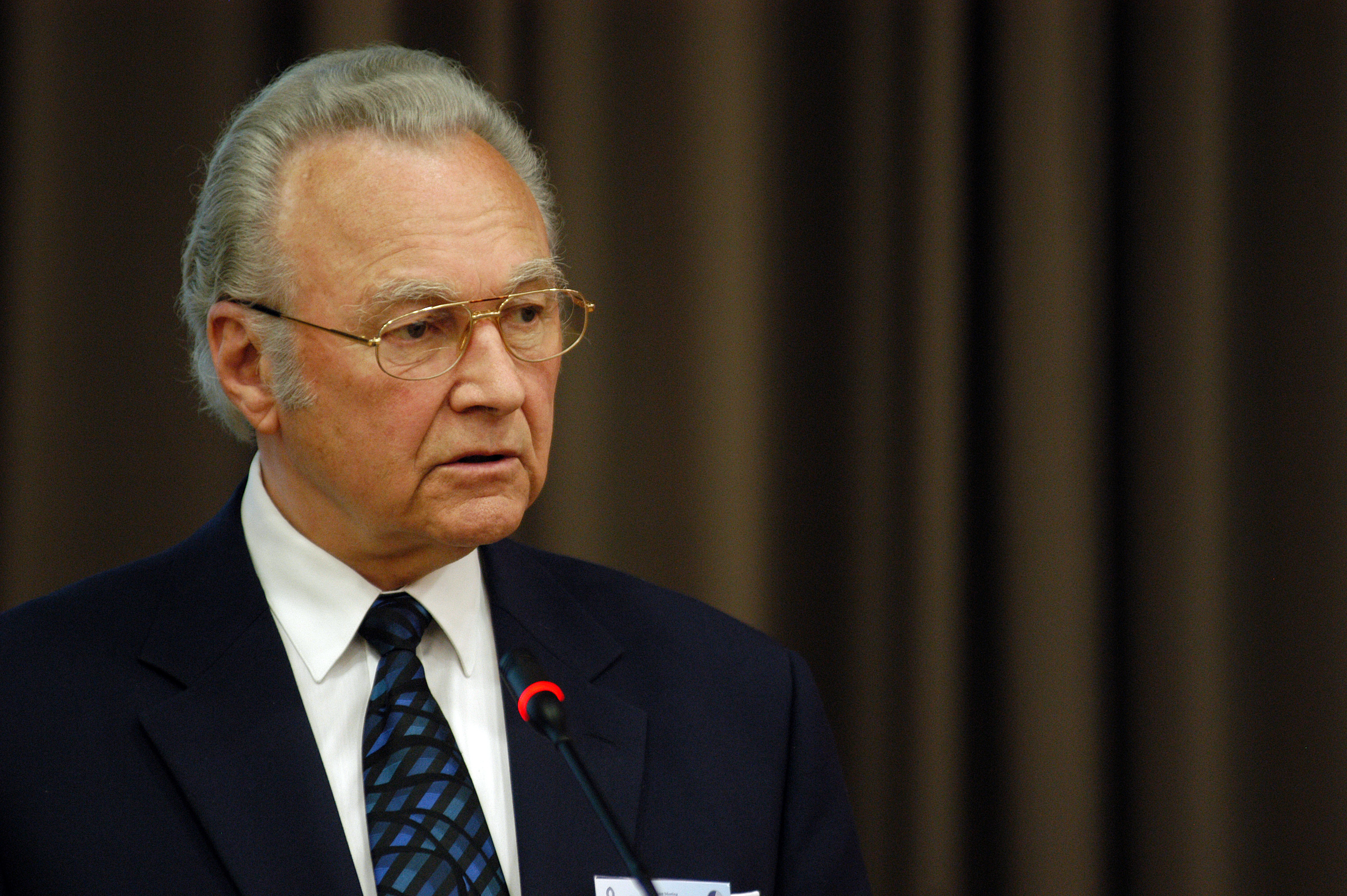 Estlands president Arnold Rüütel.